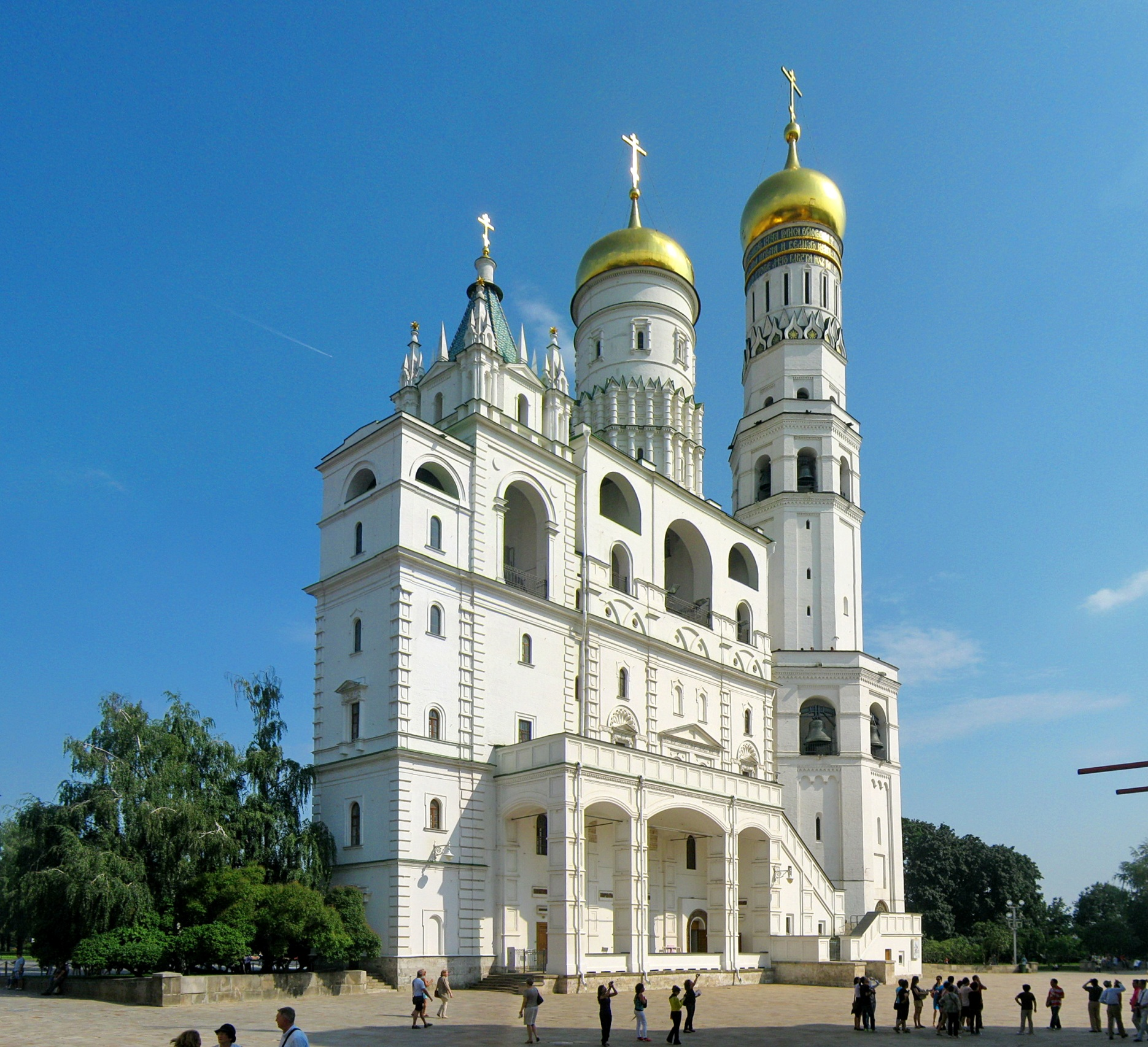 (Москва и Московская область, Москва, Соборная площадь)